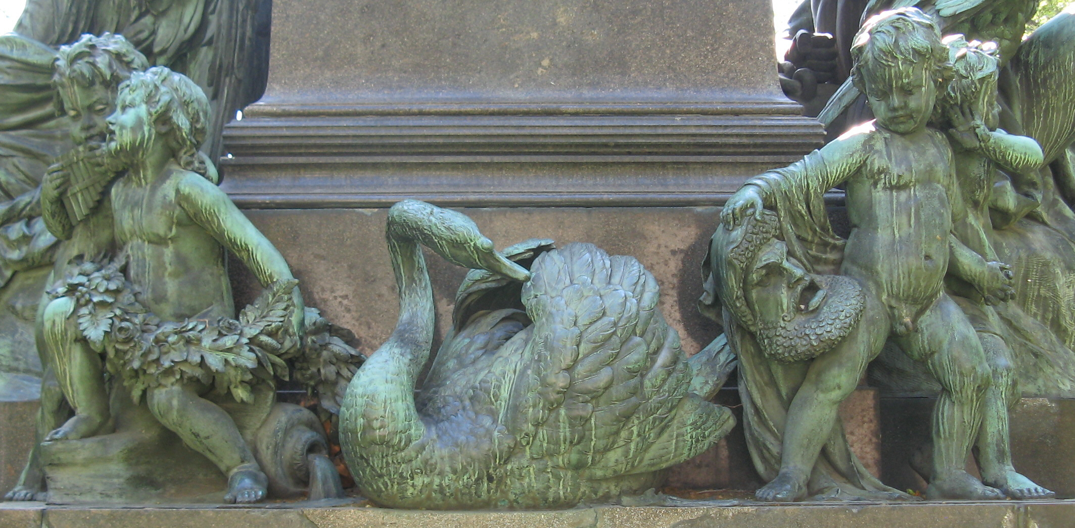 Putten vom Beethoven-Denkmal von Kaspar von Zumbusch (1880) in Wien